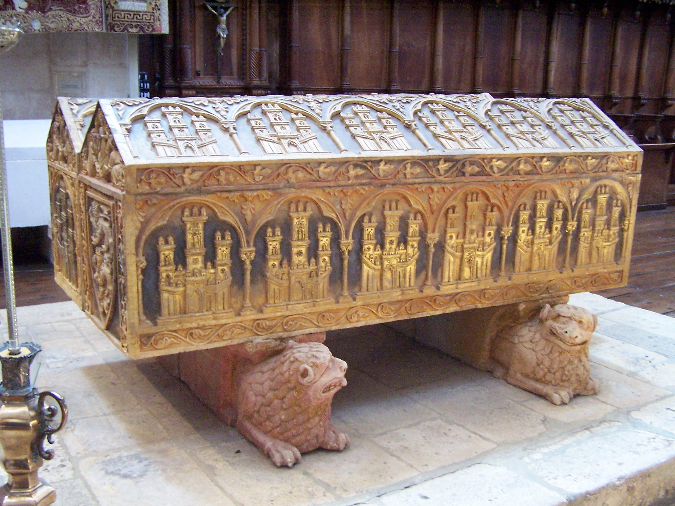 Sepulcro del rey Alfonso VIII de Castilla (1155-1214) y de su esposa, la reina Leonor de Plantagenet (1160-1214). (monasterio de las Huelgas de Burgos).